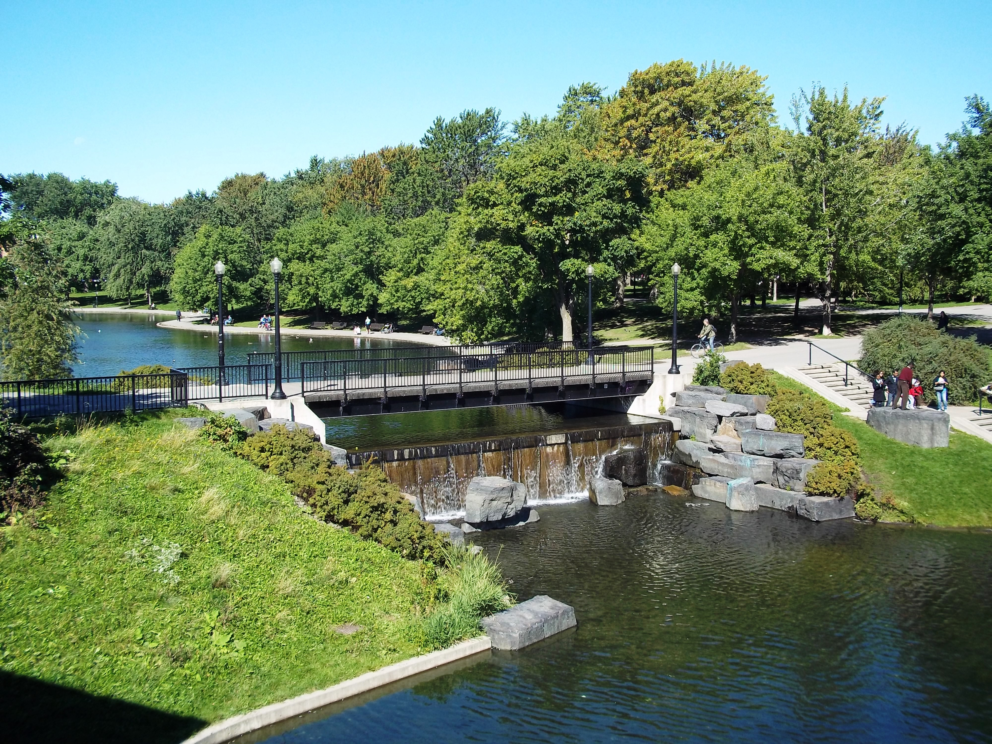 Étang, parc La Fontaine, Montréal